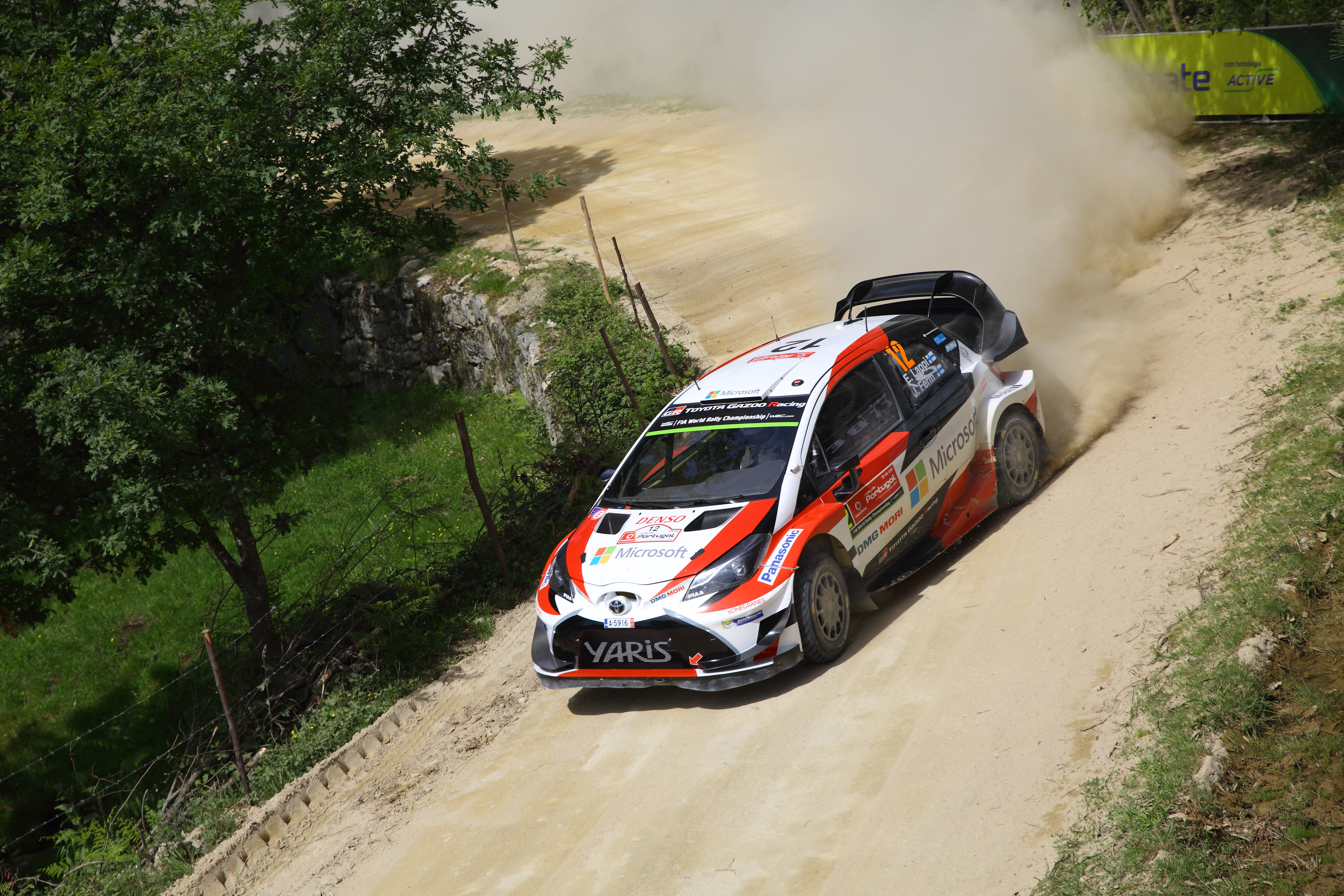 2017 Rally de Portugal